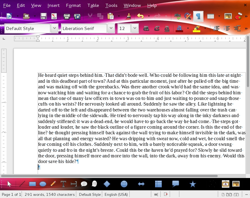 Темы оформления Firefox, начиная с версии LibreOffice 4.4.x, теперь применяются не только к верхней области, но и к нижней панели инструментов.